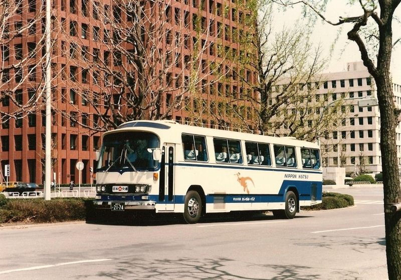 1980年頃の日本交通カンガルーバス